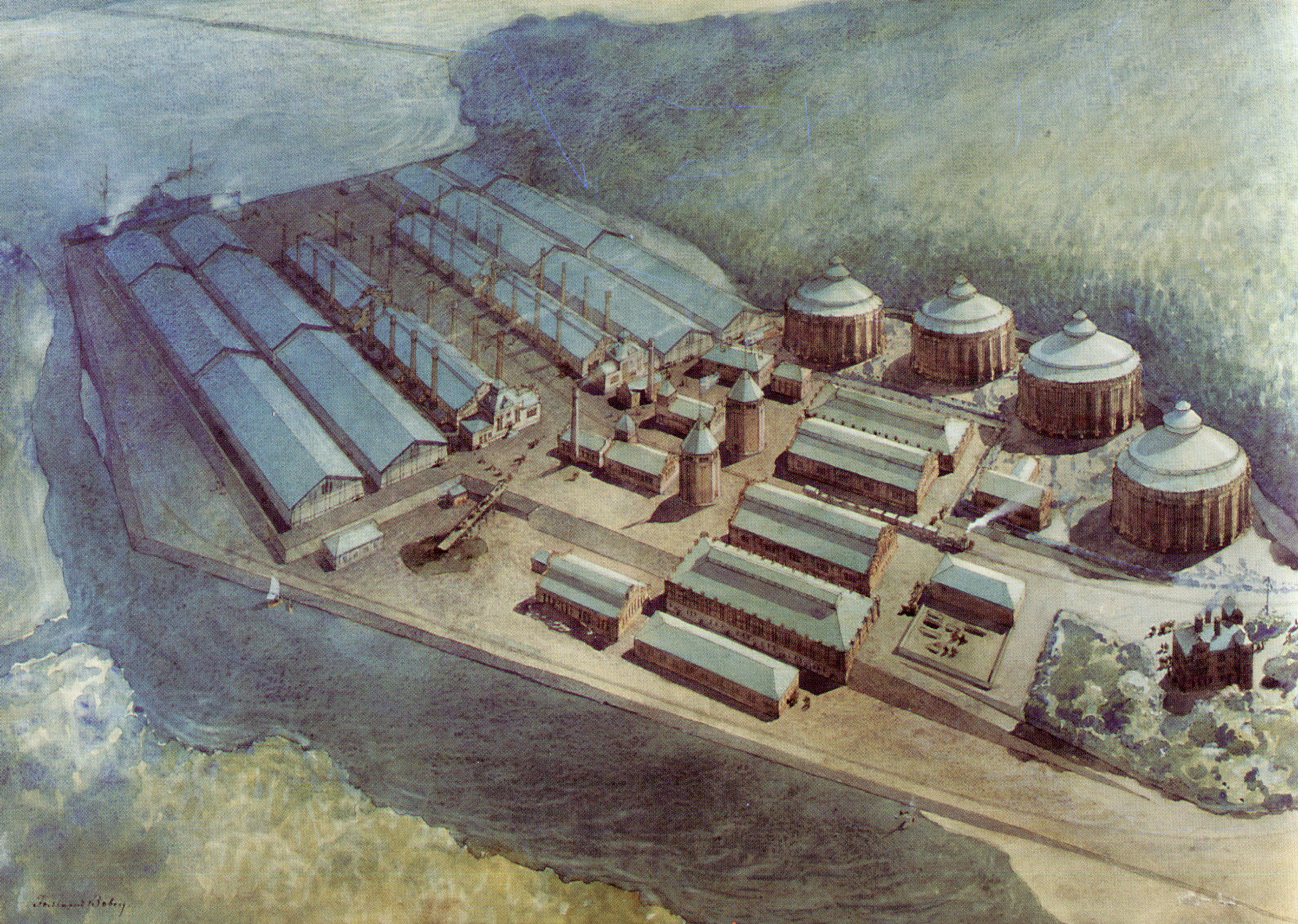 Värtagasverket, fågelperspektiv